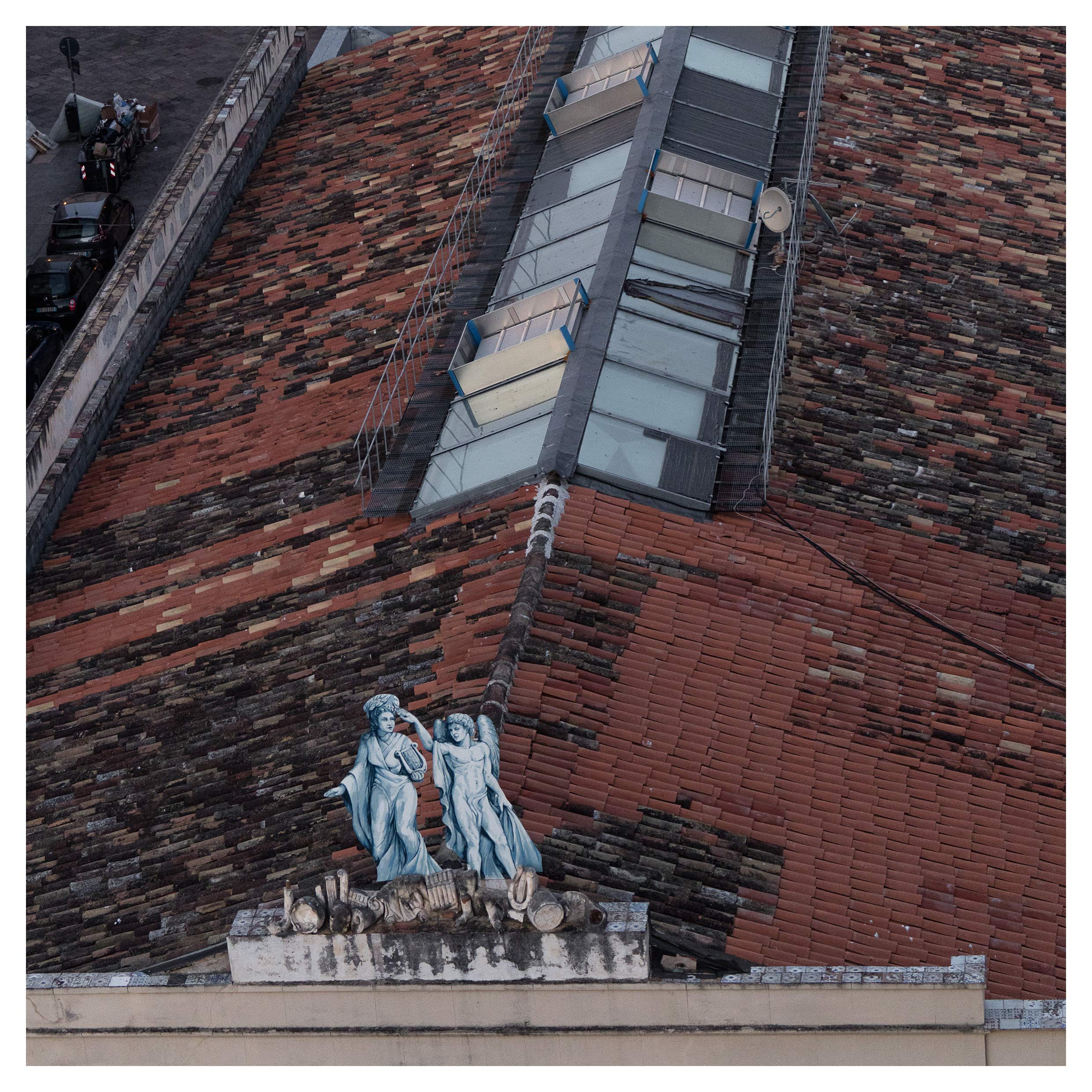 vista sui tetti